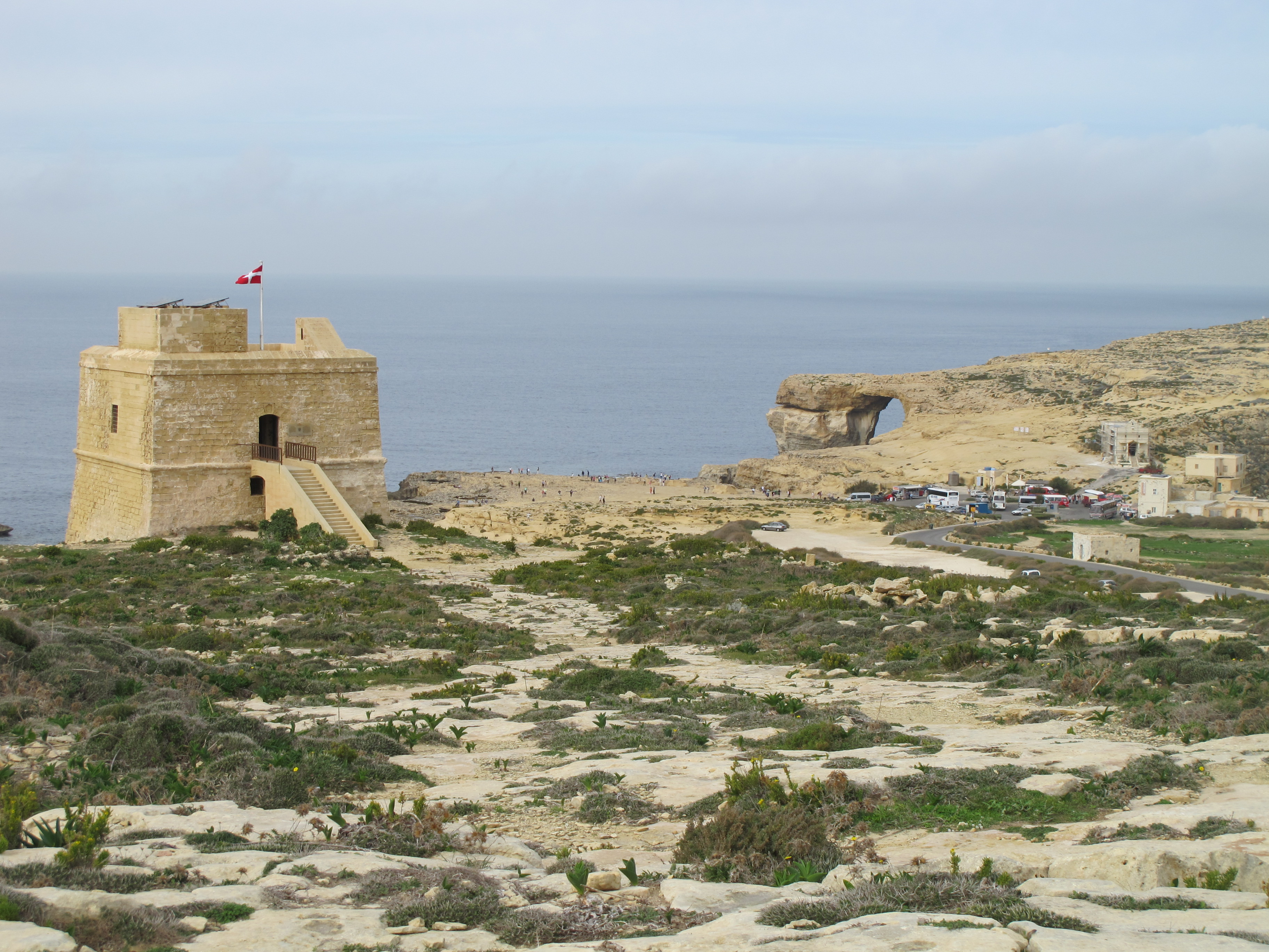 Dwejra Tower Nov 2014